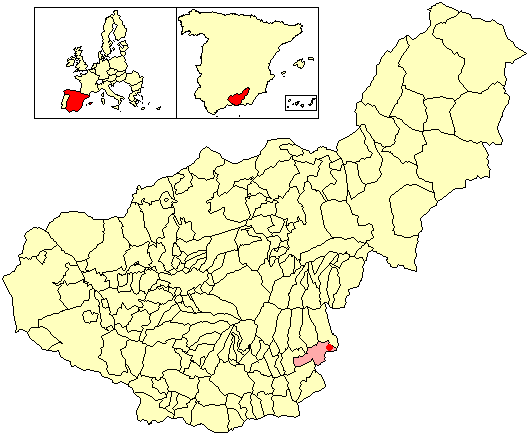 Situación de la localidad de Cherín (en el municipio de Ugíjar) respecto a la provincia de Granada, en España.